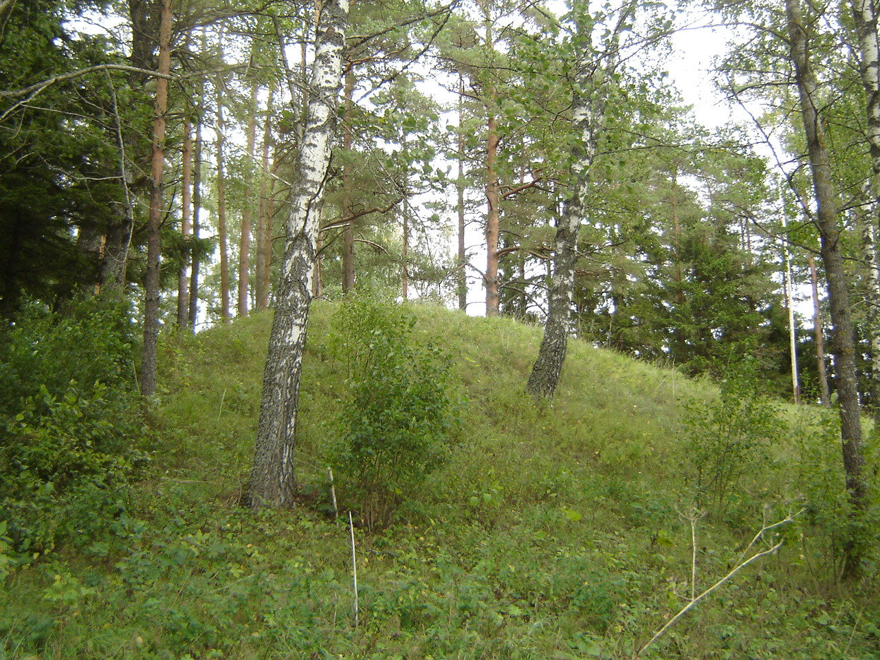 Keava linnamäe lõunapoolne külg